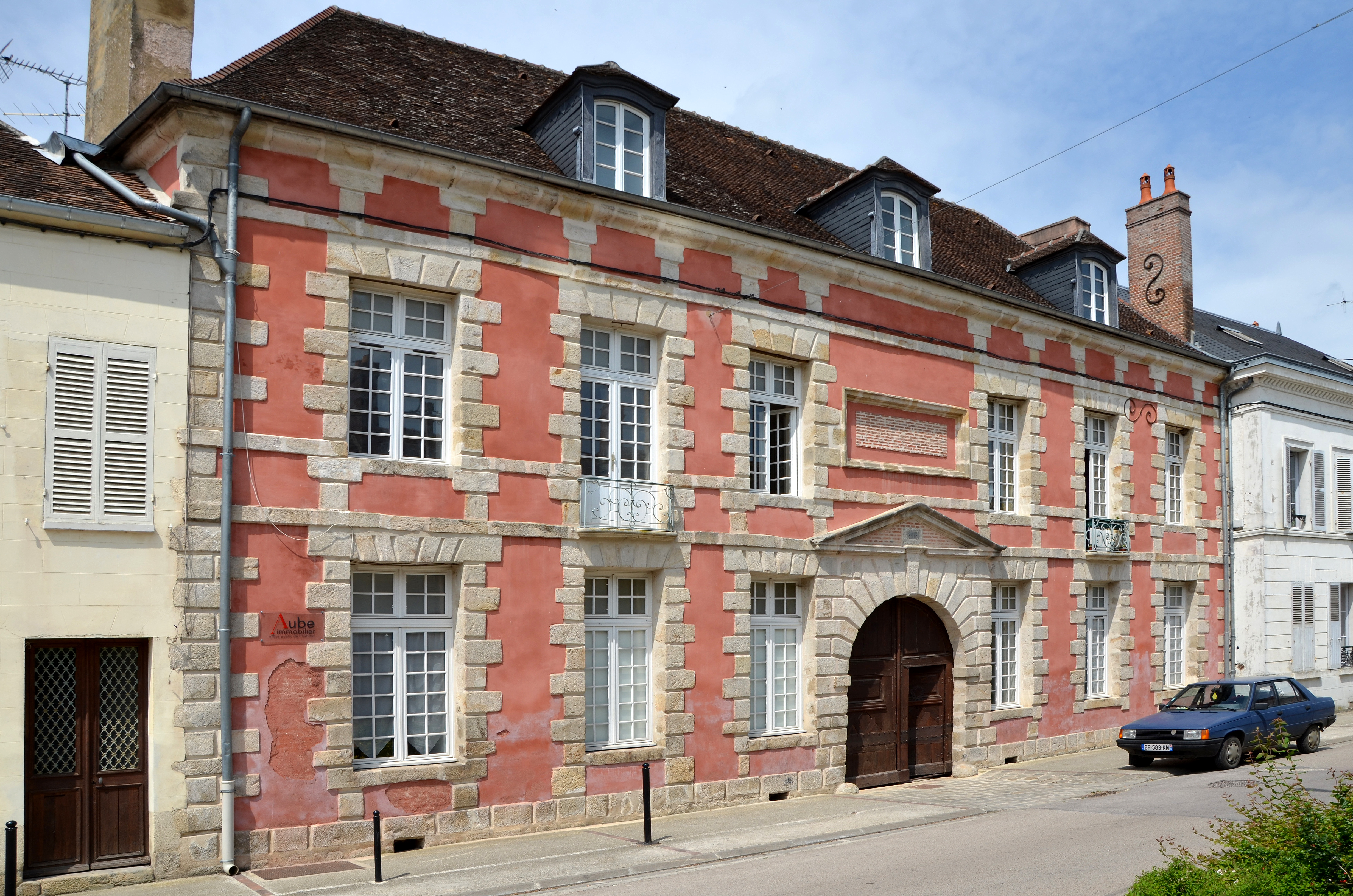 Maison du 17ème siècle à Villenauxe-la-Grande, Aube, France